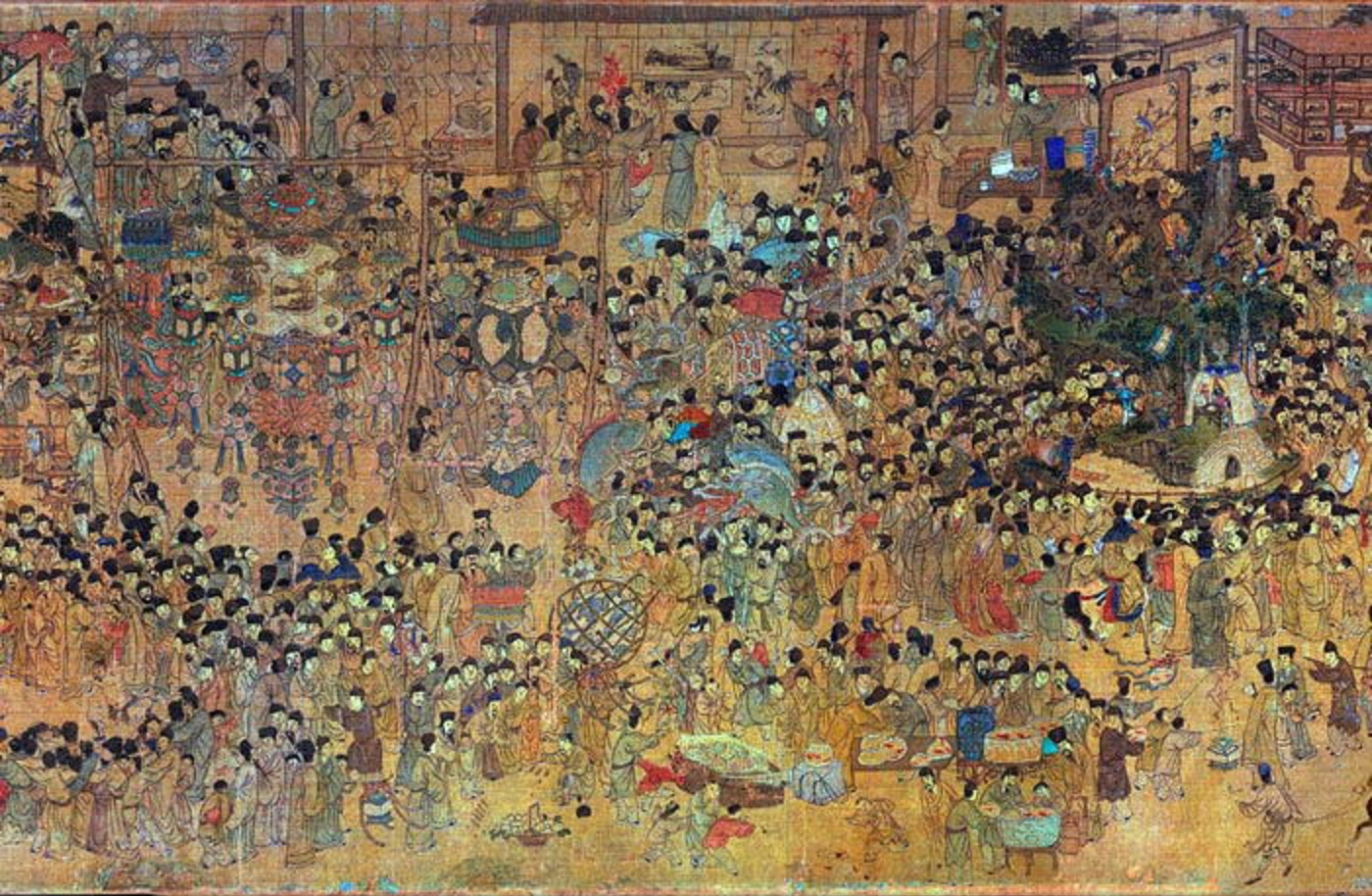 中文（香港）: 明《上元燈彩圖》